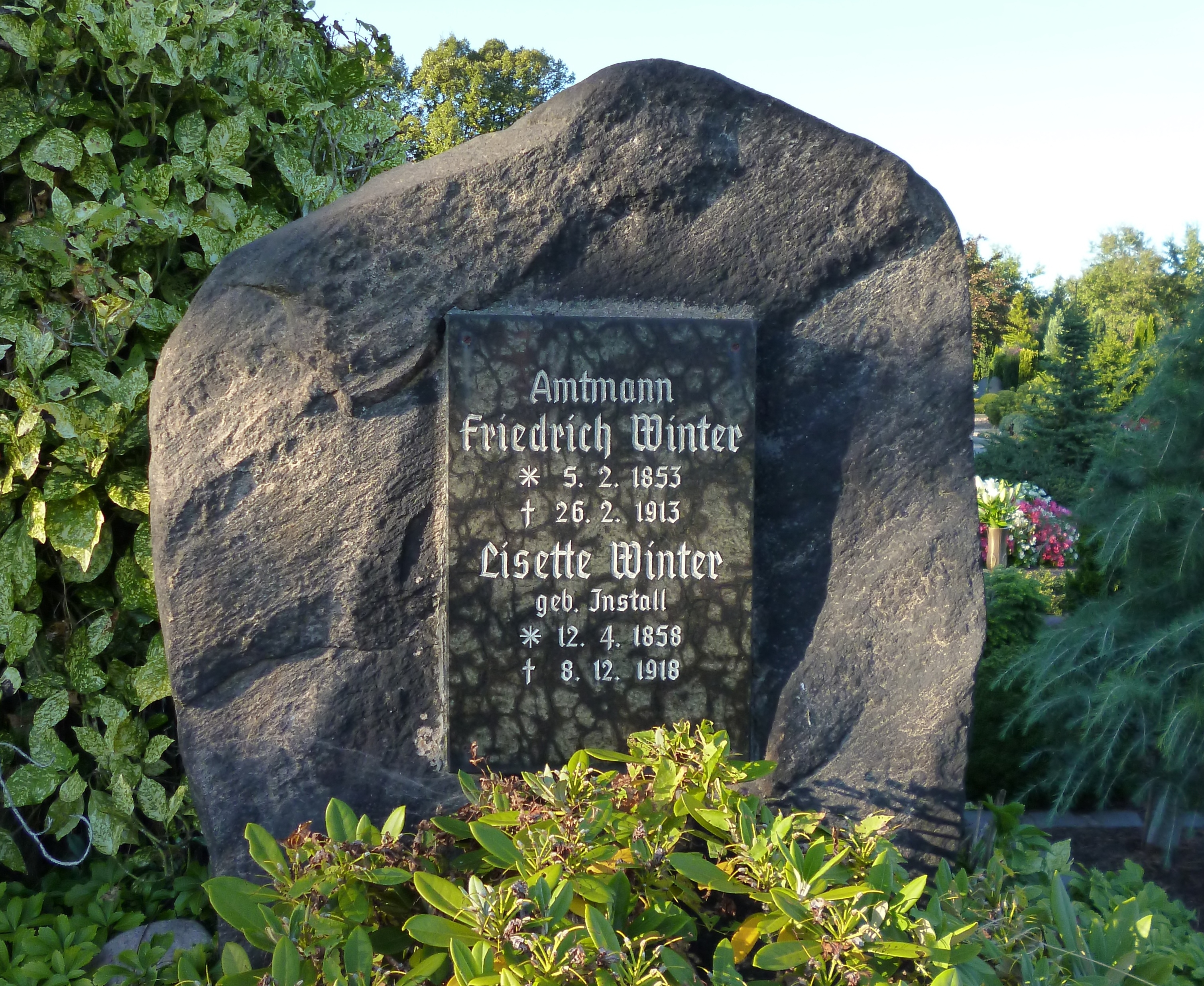 Gedenkstein Amtmann Friedrich Winter auf dem ev. Friedhof Wanne in der Claudiusstraße in Herne-Wanne This is a photograph of an architectural monument.